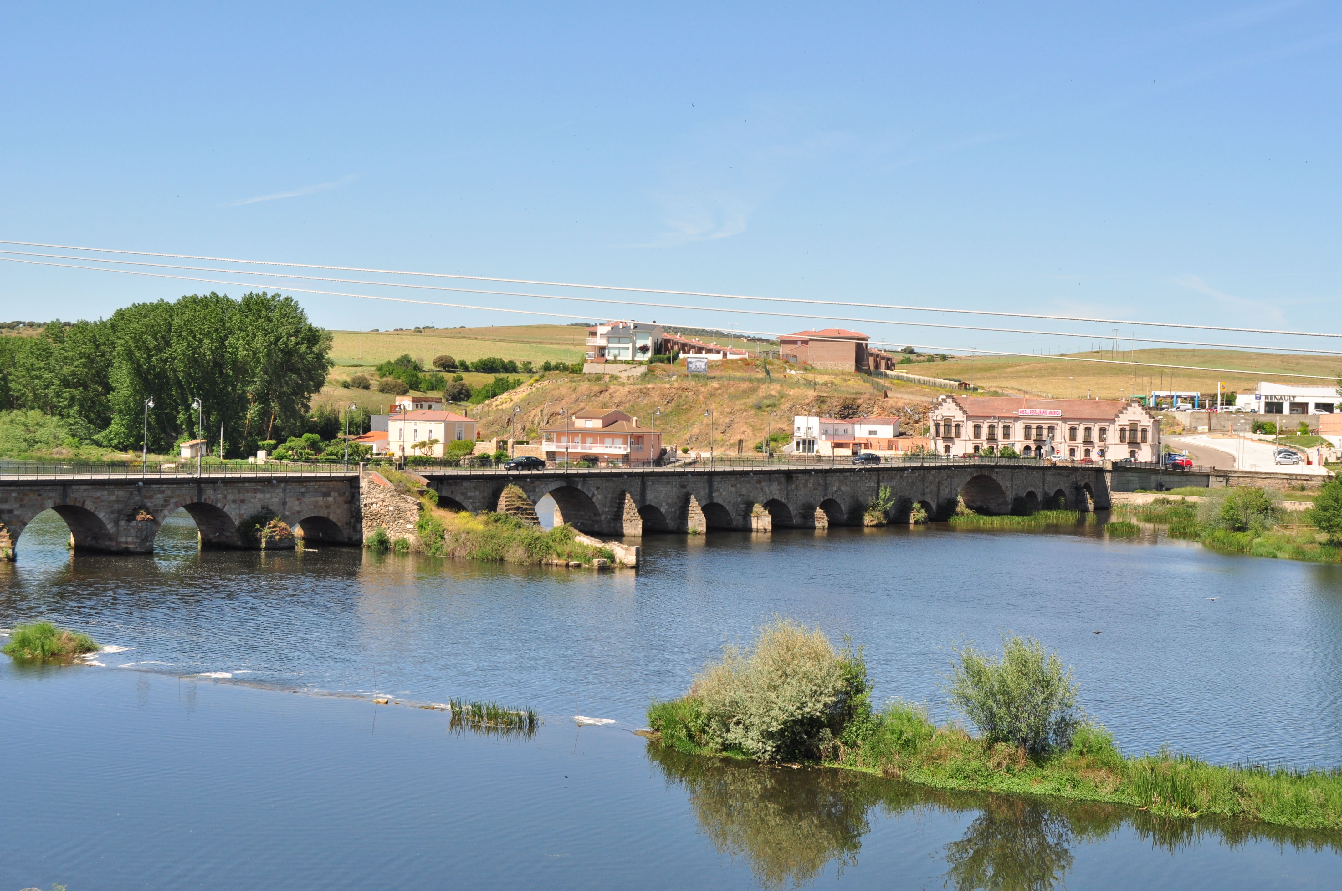 Alba de Tormes - 027